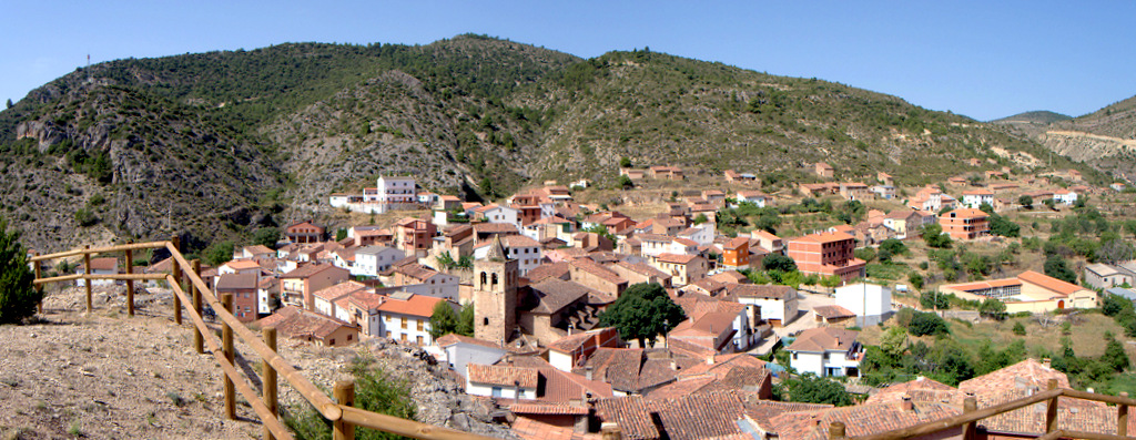 Vista panorámica de El Cuervo (Teruel), desde el Castillo, con detalle del campanario de la parroquial.